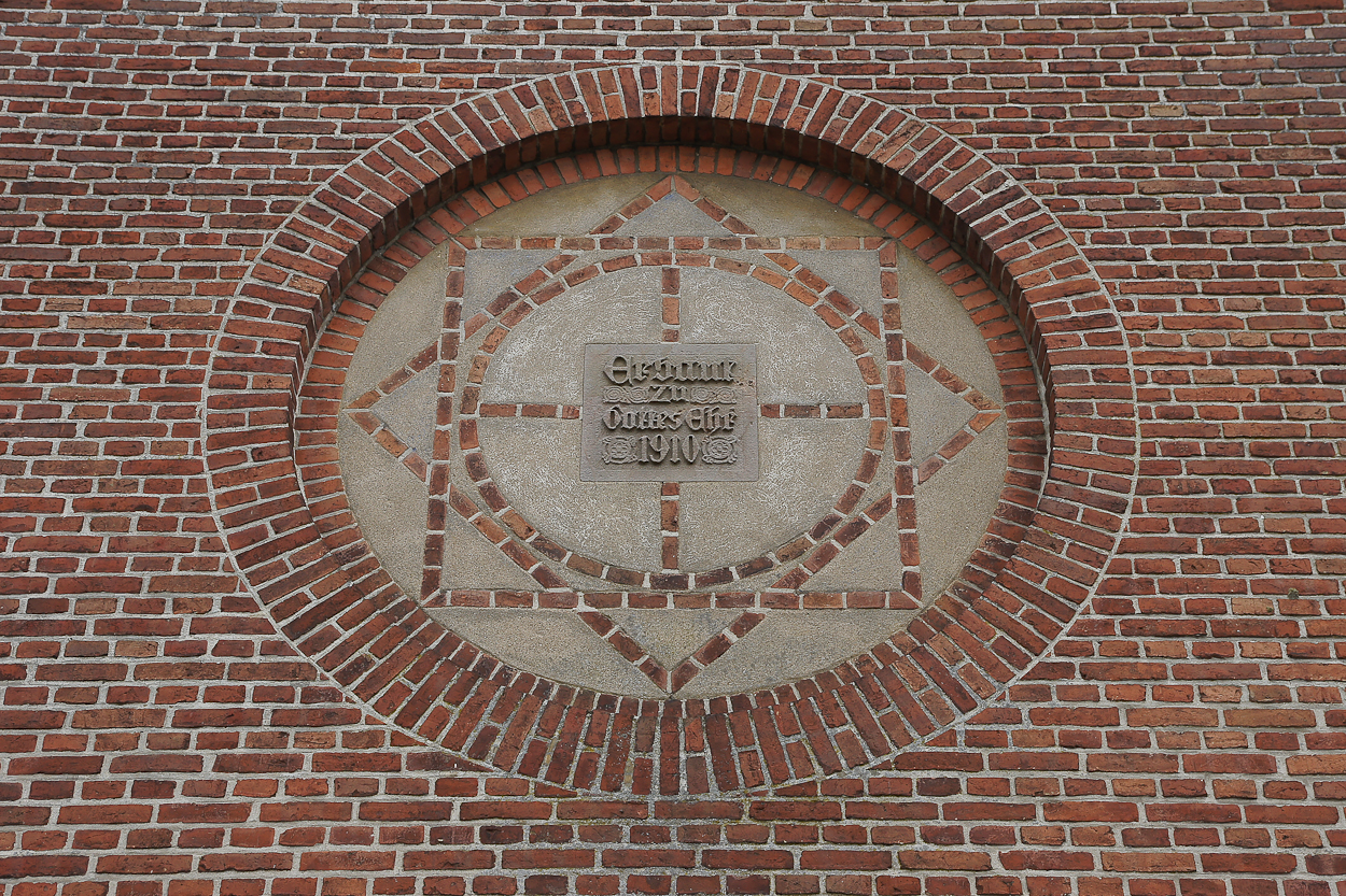 Heilands Kapelle in Flensburg Weiche, Denkmal-Nr, 3 Standort: 54.758043, 9.402076 Ostseite, Blickrichtung nach Westen, Rückseite